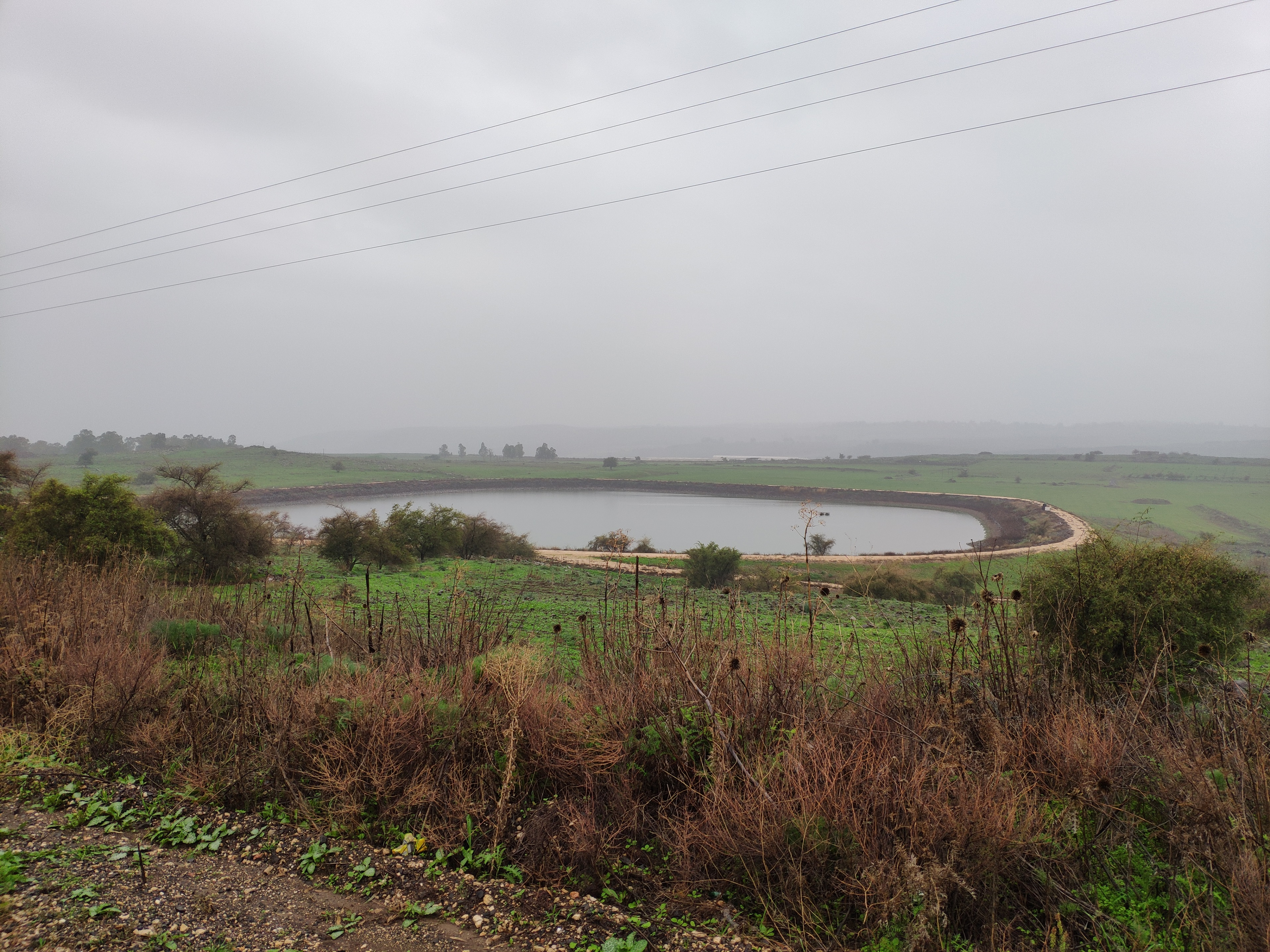 מאגר קולחין חד-נס, על כביש 888 ברמת הגולן